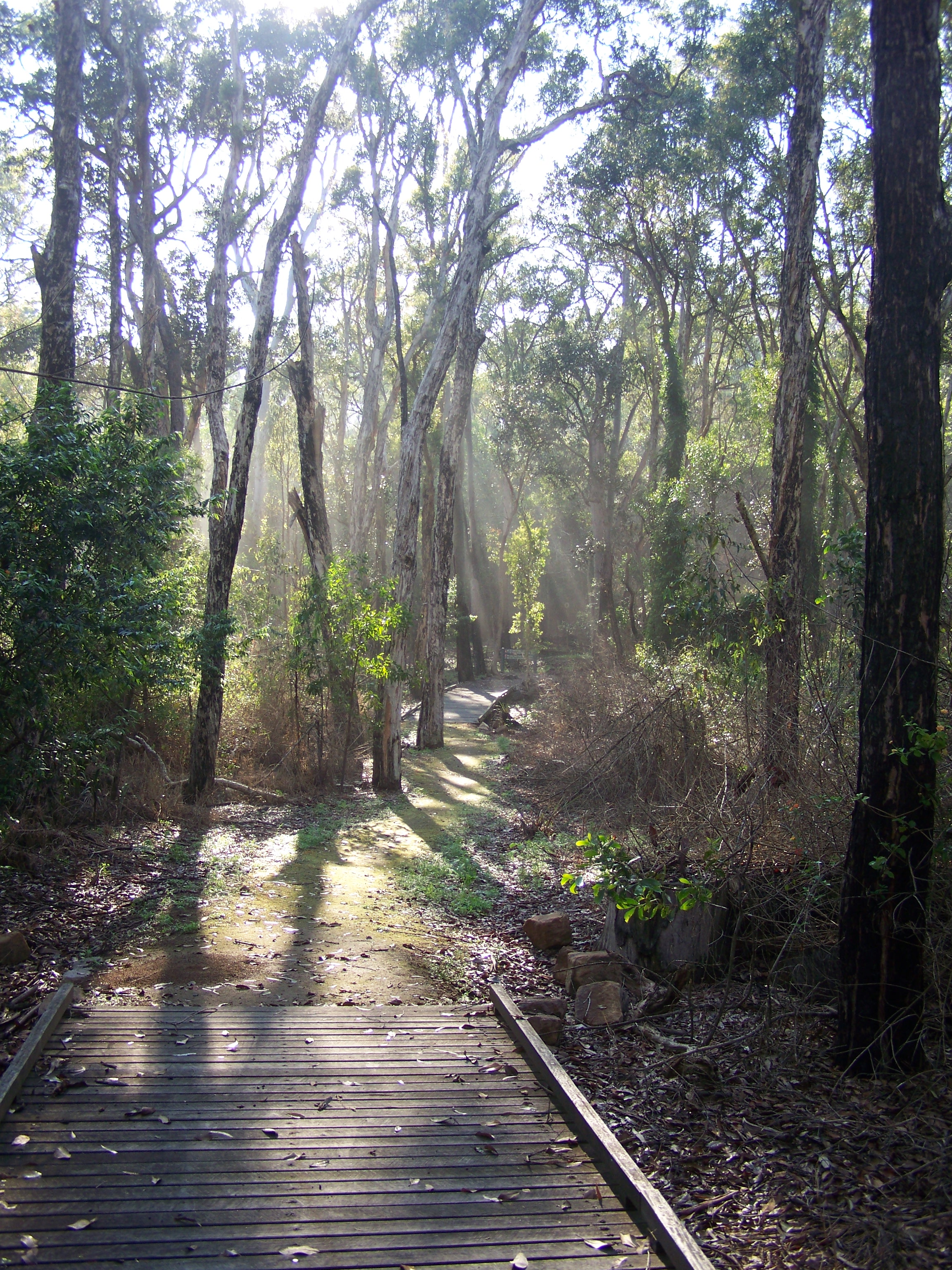 Six Mile Creek Boardwalk